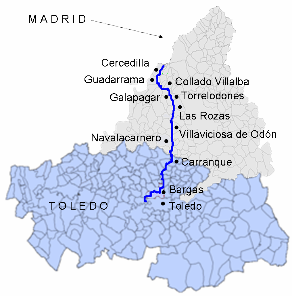 Guadarrama river, map